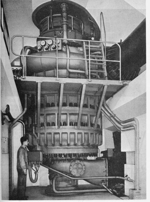 Fünfstufige Speicherpumpe im Etzelwerk.